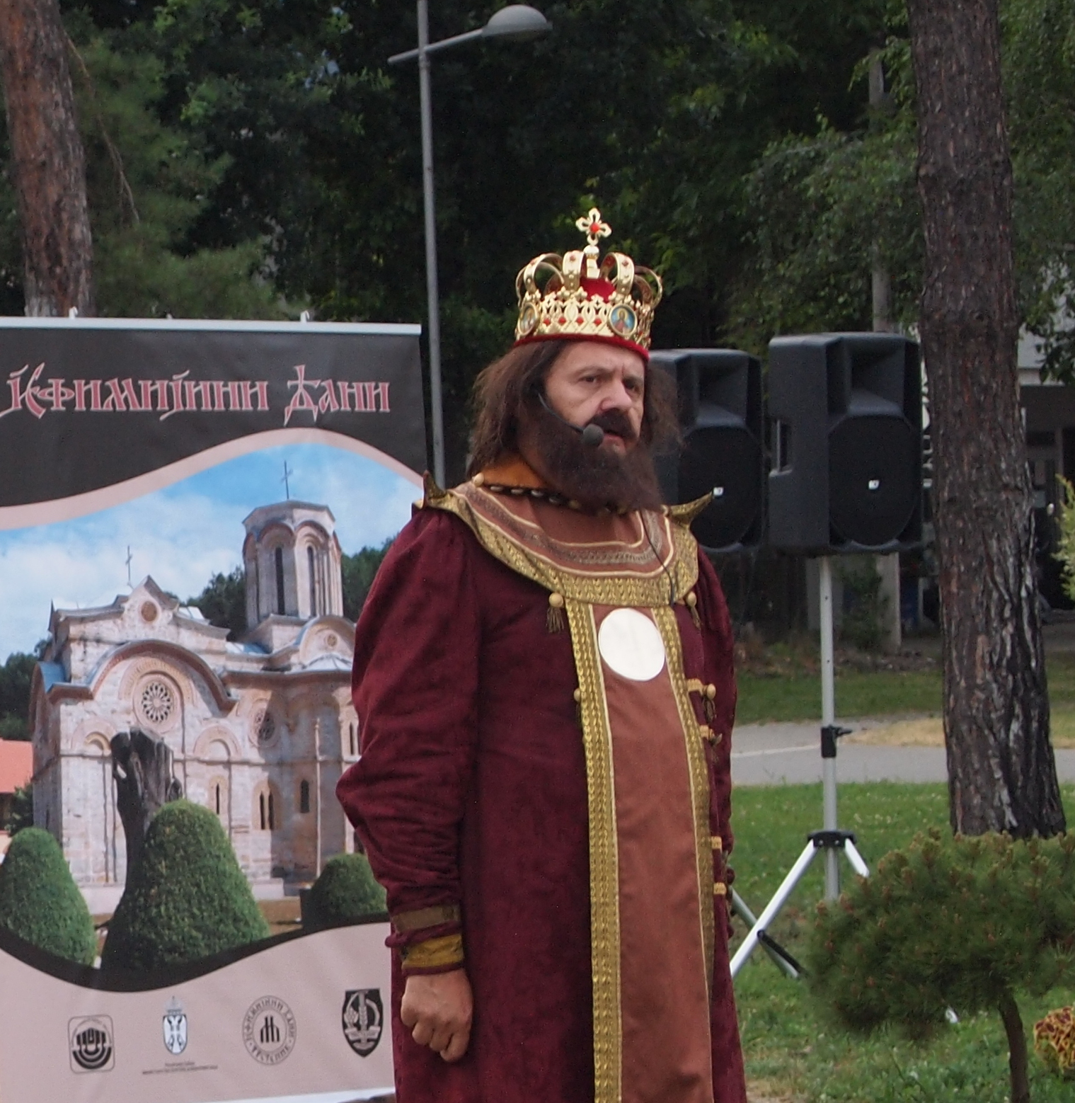 Srpski (latinica): Glumac Lepomir Ivaković kao knez Lazar na Svečanom otvaranju manifestacije Jefimijini dani na Trgu Kneginje Milice 2018.